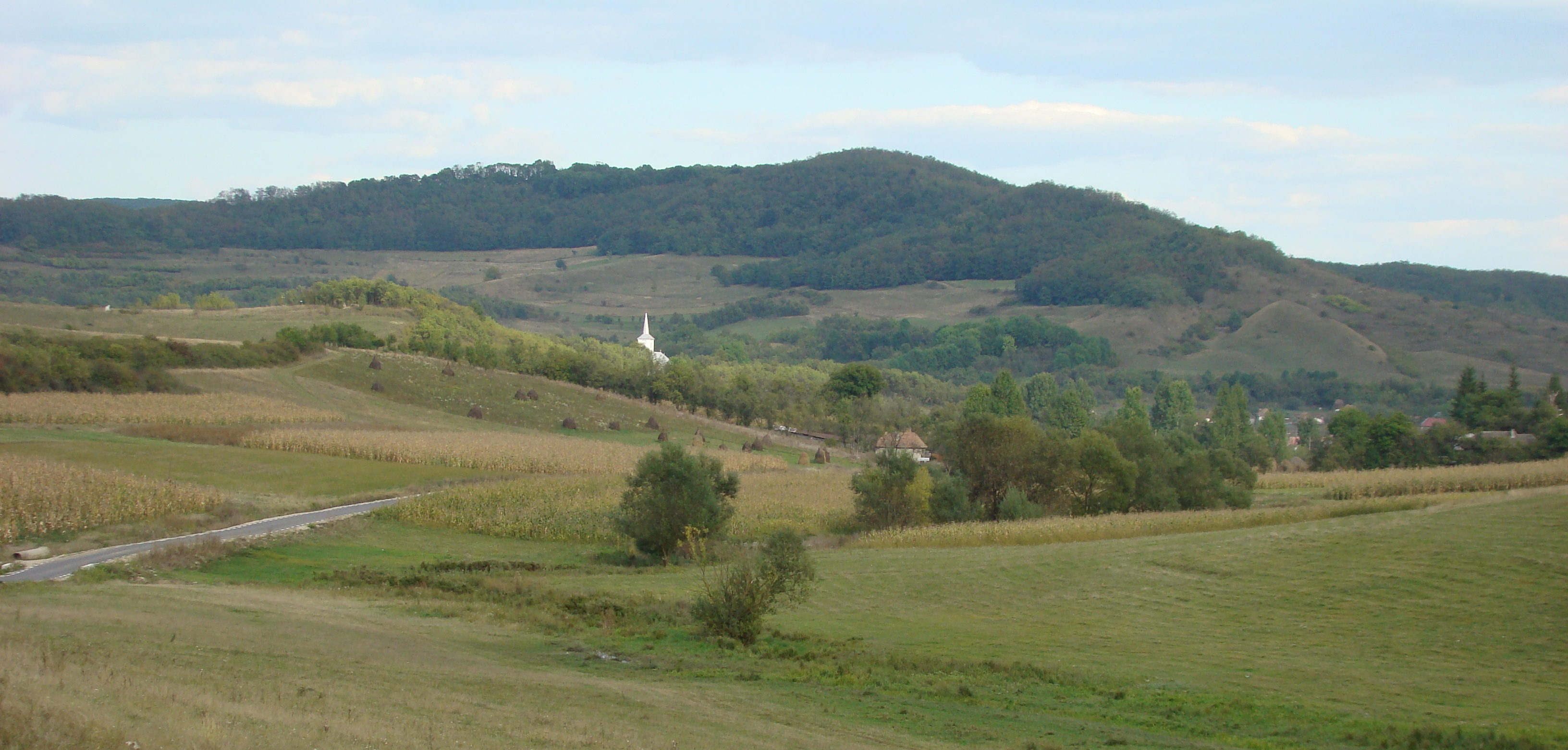 Drumul comunal Panticeu-Cubleșu Someșan, județul Cluj